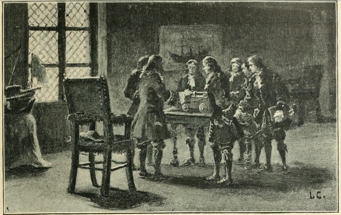 Les gardes-marine étudiant l'artillerie en salle sous Louis XIV. Dessin réalisé en 1893 pour illustrer l'ouvrage de Maurice Loir sur la Marine française.